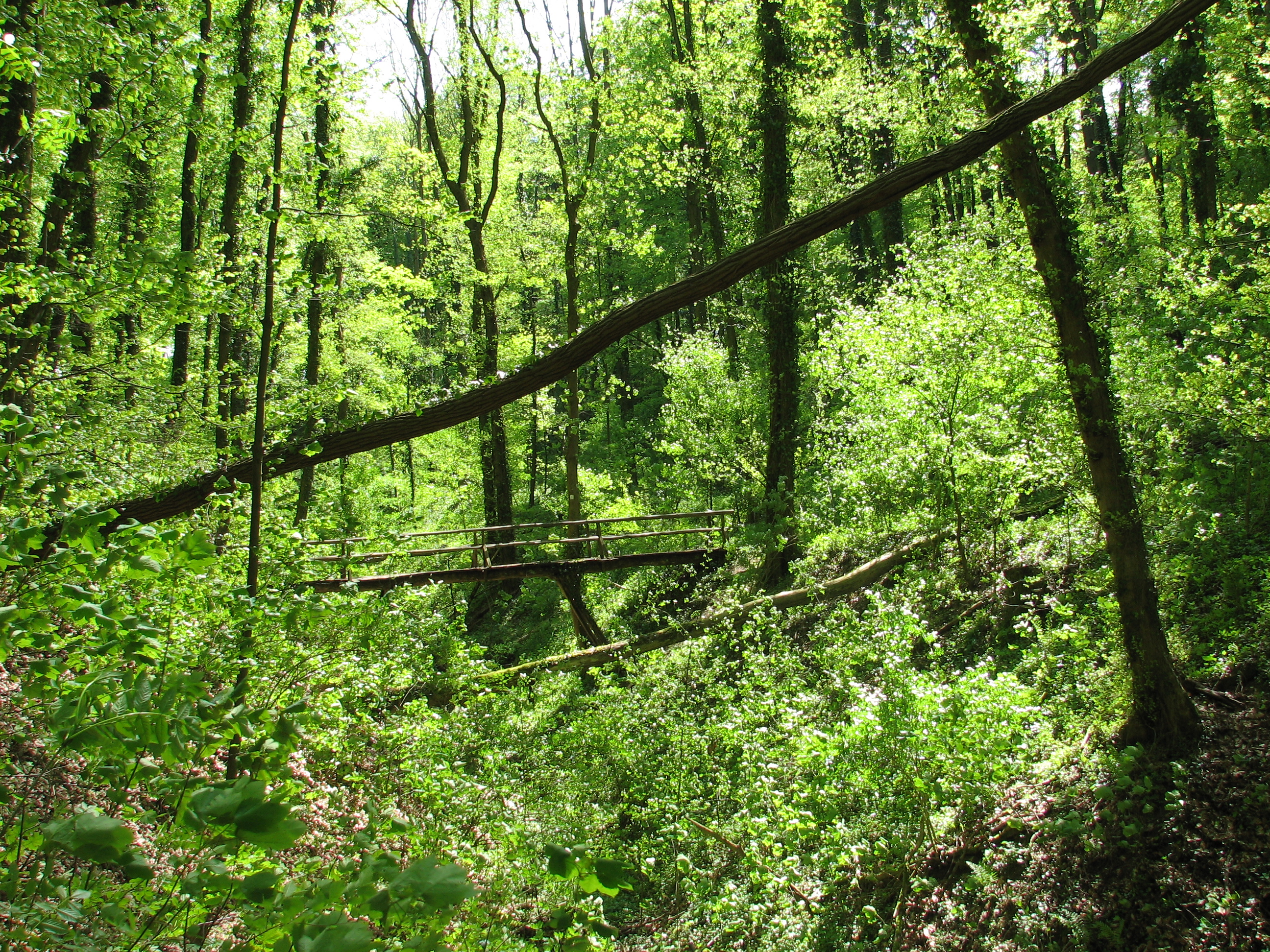 Ungeheuerklamm bei Bruchsal-Untergrombach